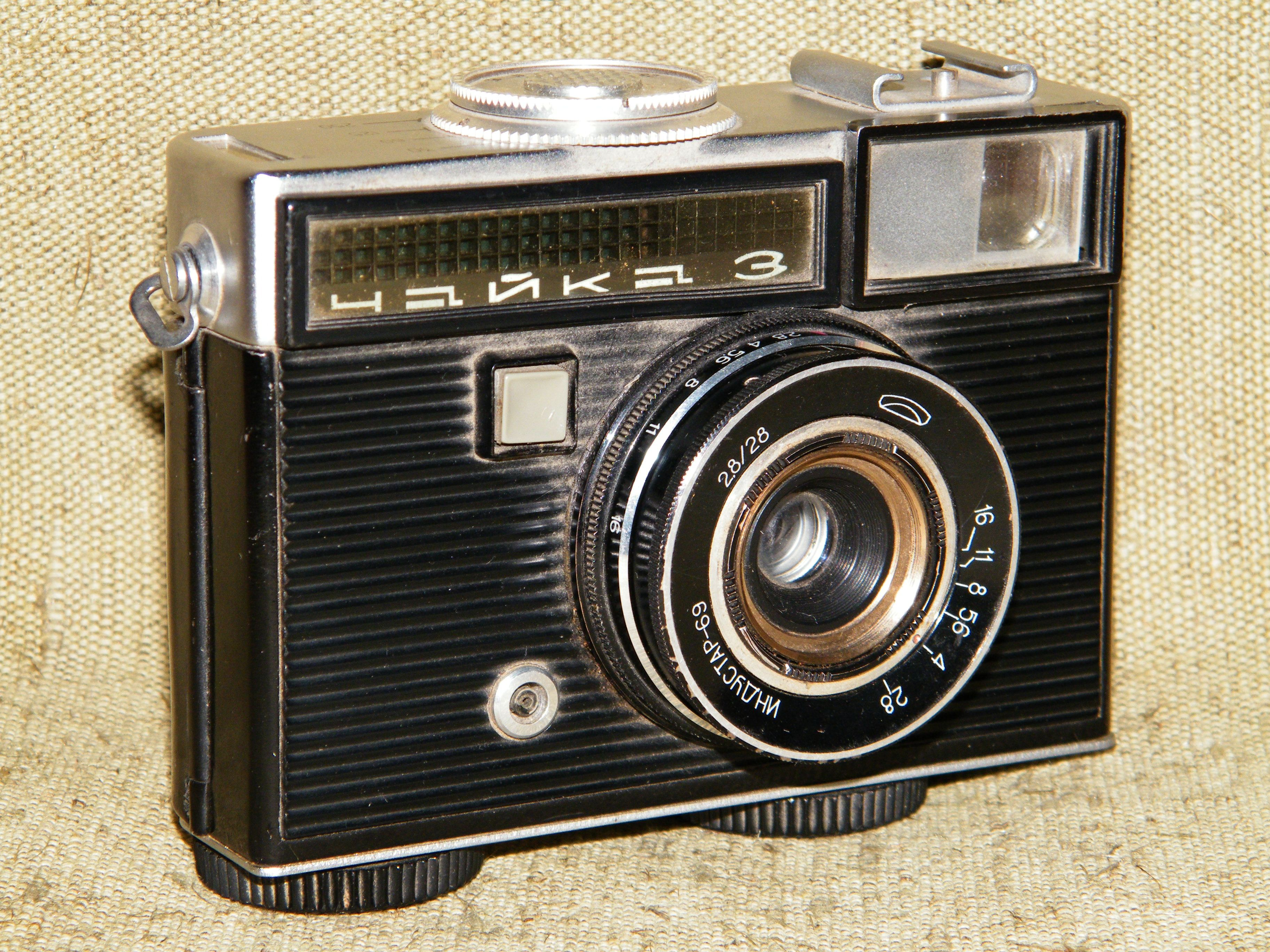 Chaika 3